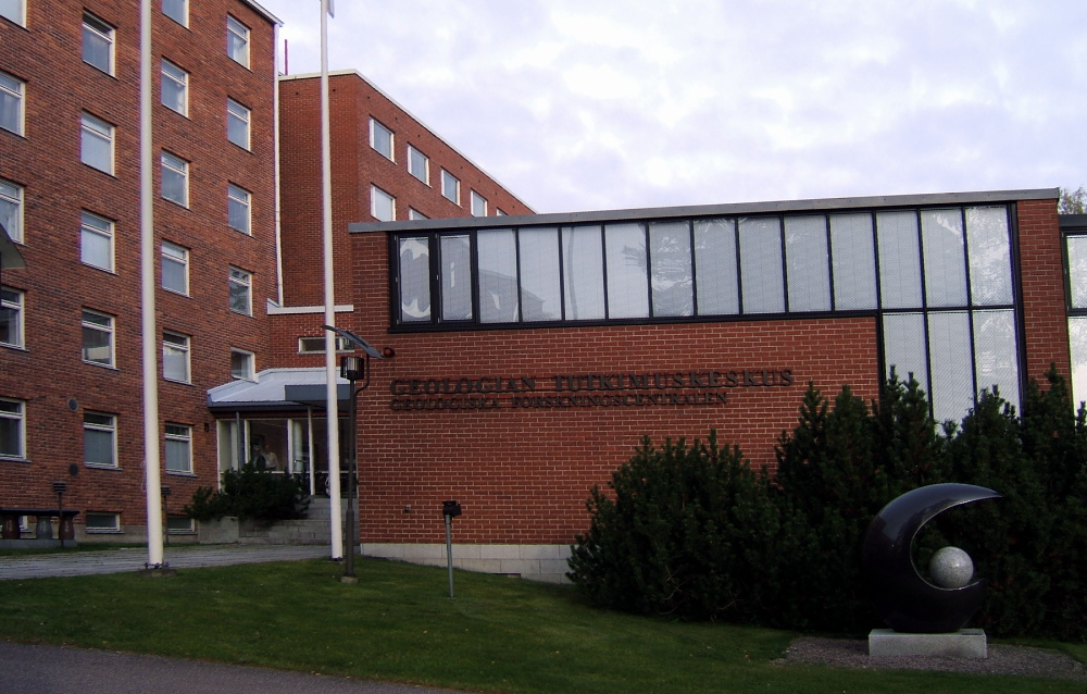 Geologisen tutkimuskeskuksen toimipaikka Espoon Otaniemessä